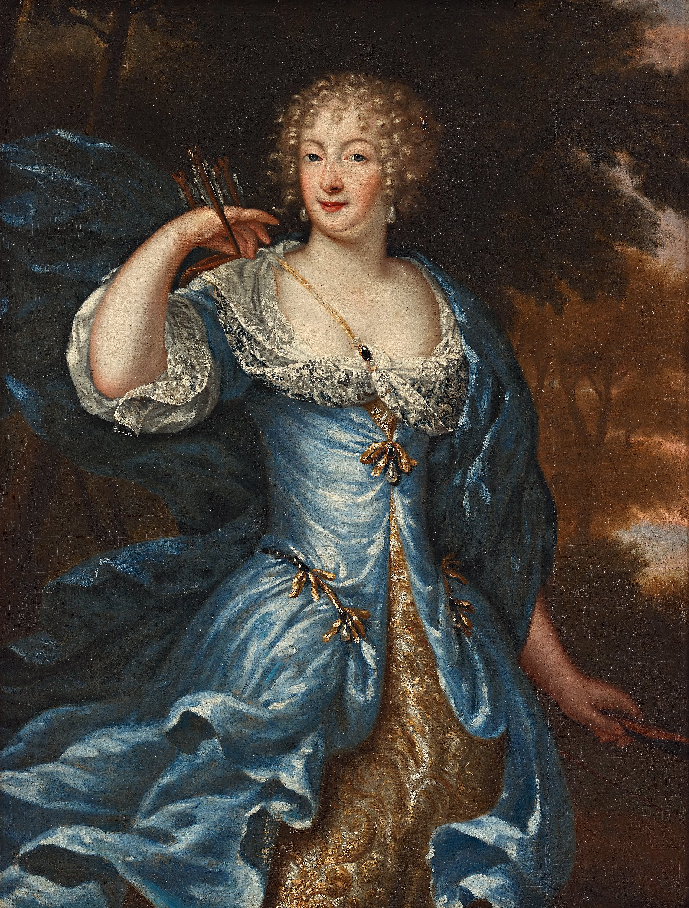 Målning av Elsa Elisabeth Brahe (1632-1689), troligen avbildad som jaktens gudinna Diana med pilbåge och koger. Målning av David Klöcker Ehrenstrahl.